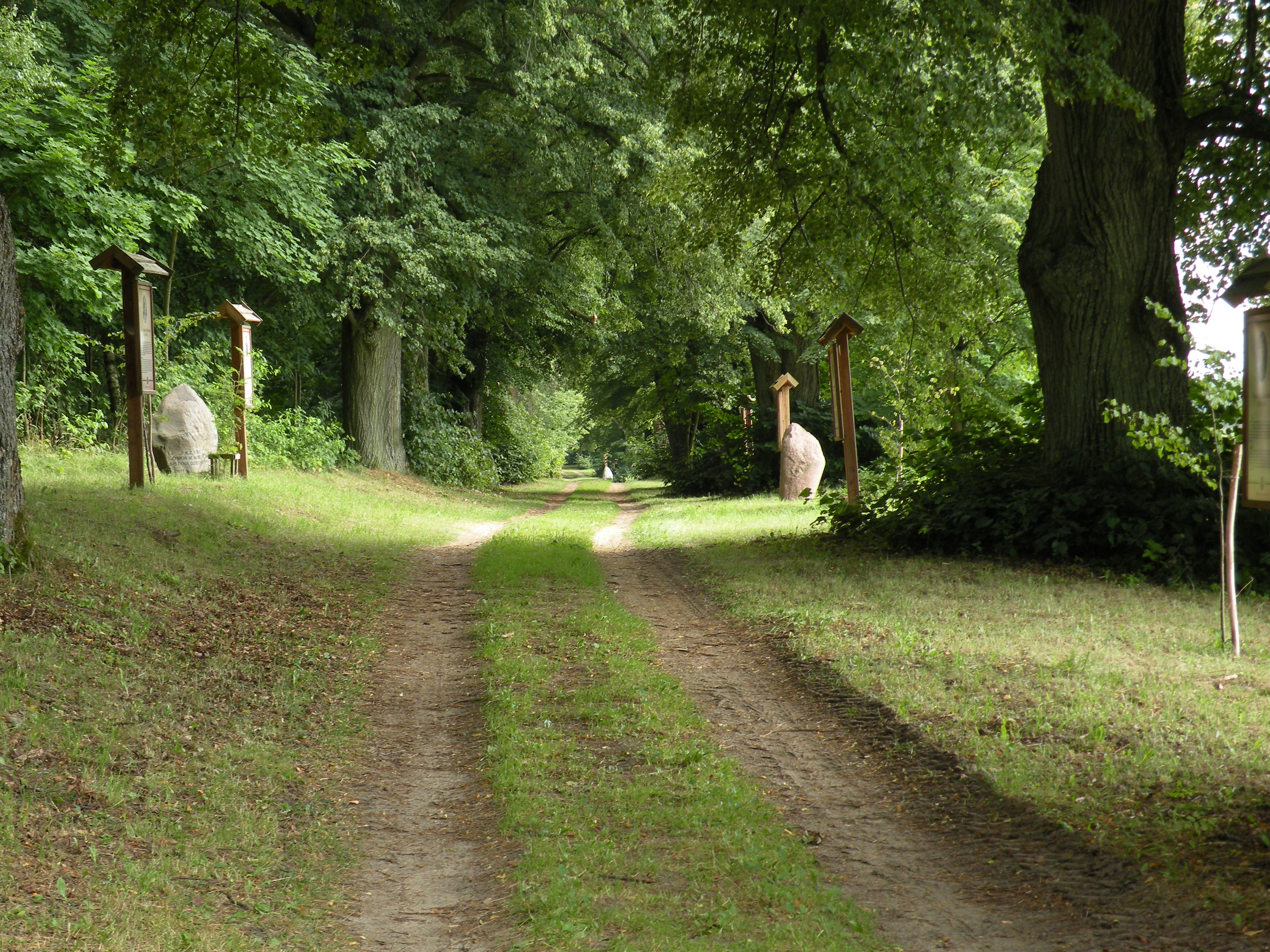 Aleja Biskupów w Bałdach, stan 2013 roku.